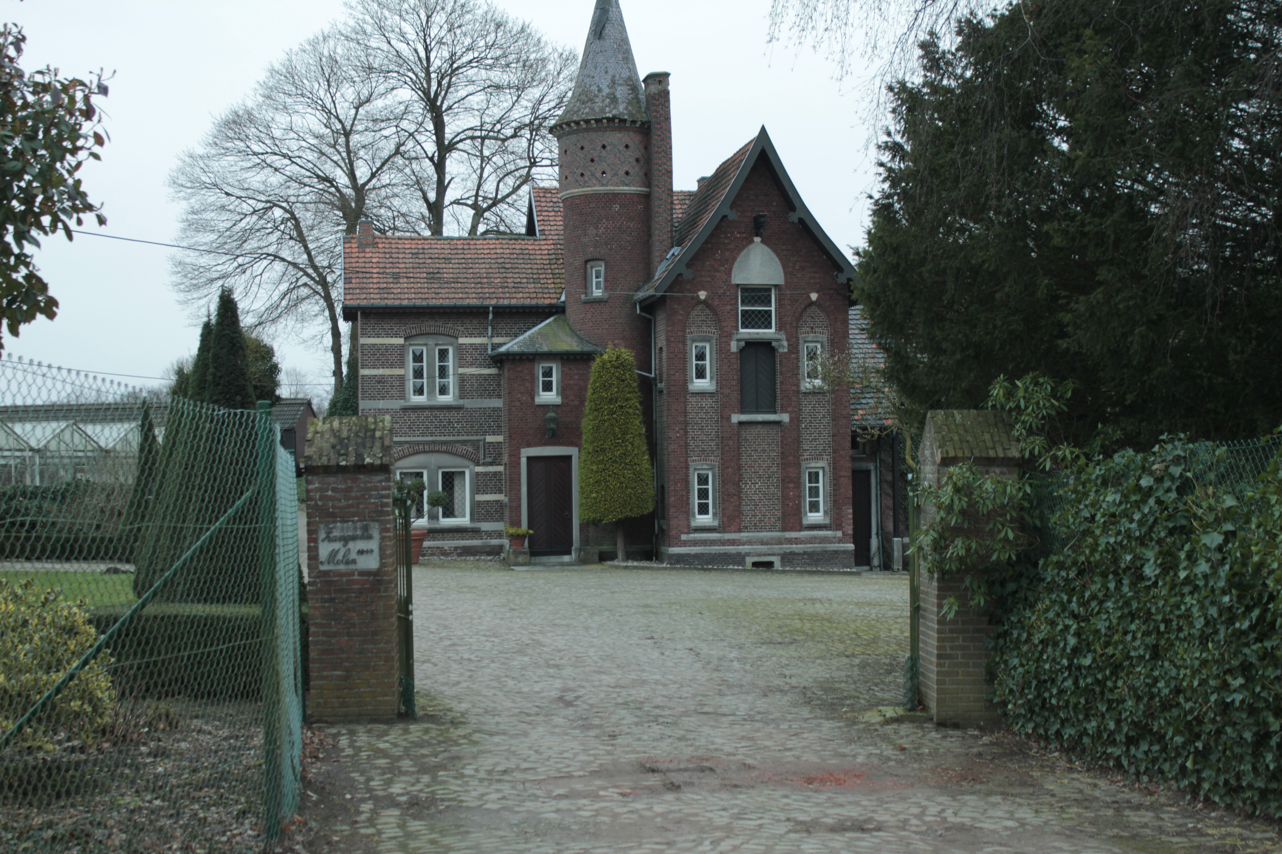 Gebouw Zangerheimolen (Eigenbilzen)